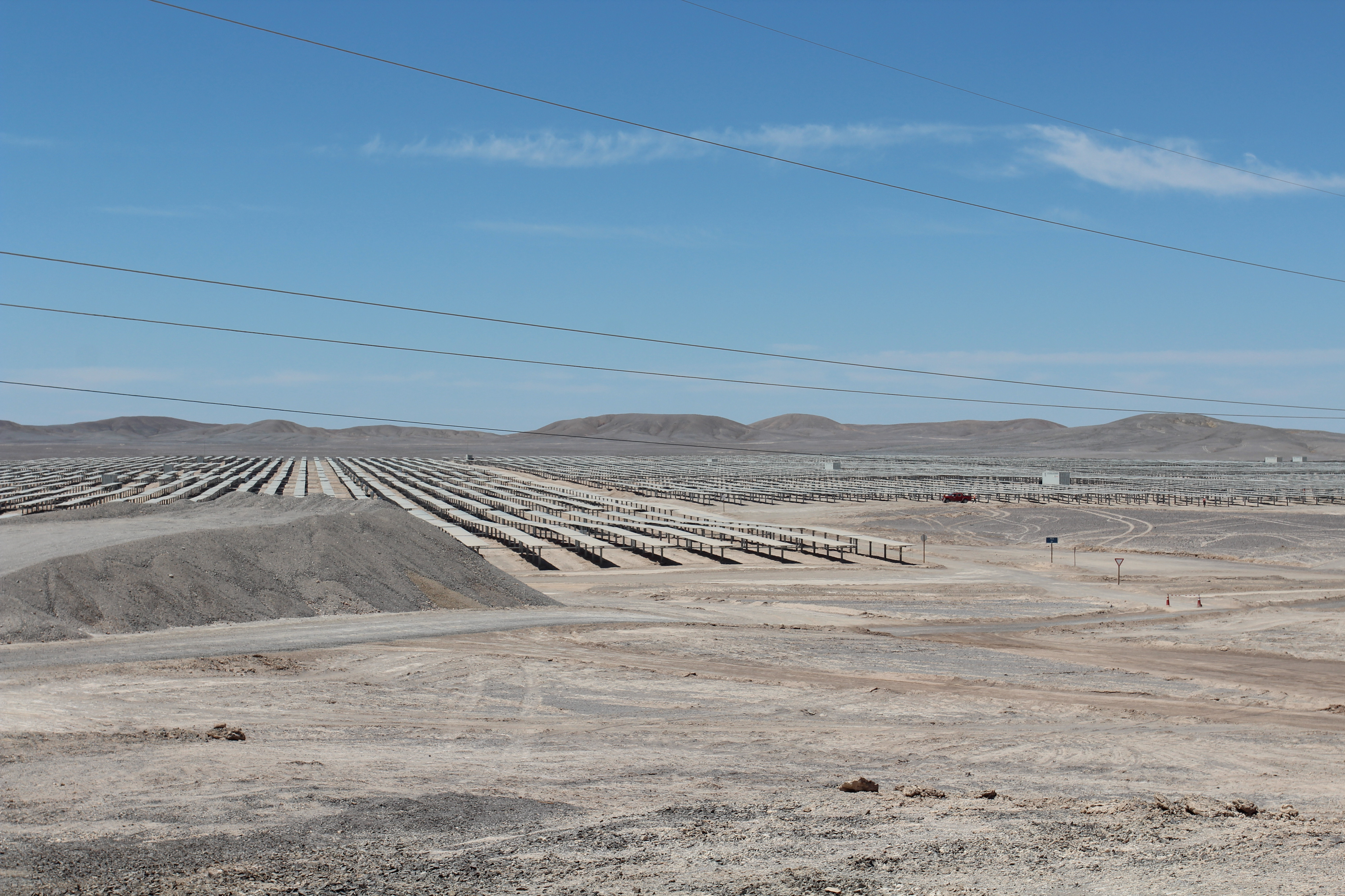 セッロ・ドミナドル発電所